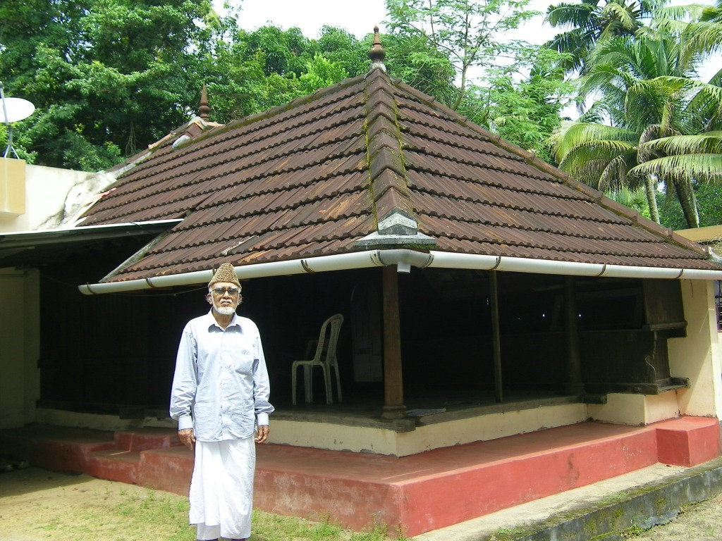 മുട്ടാണിശ്ശേരിൽ എം. കോയാക്കുട്ടി